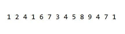 DoThiEuler_Output